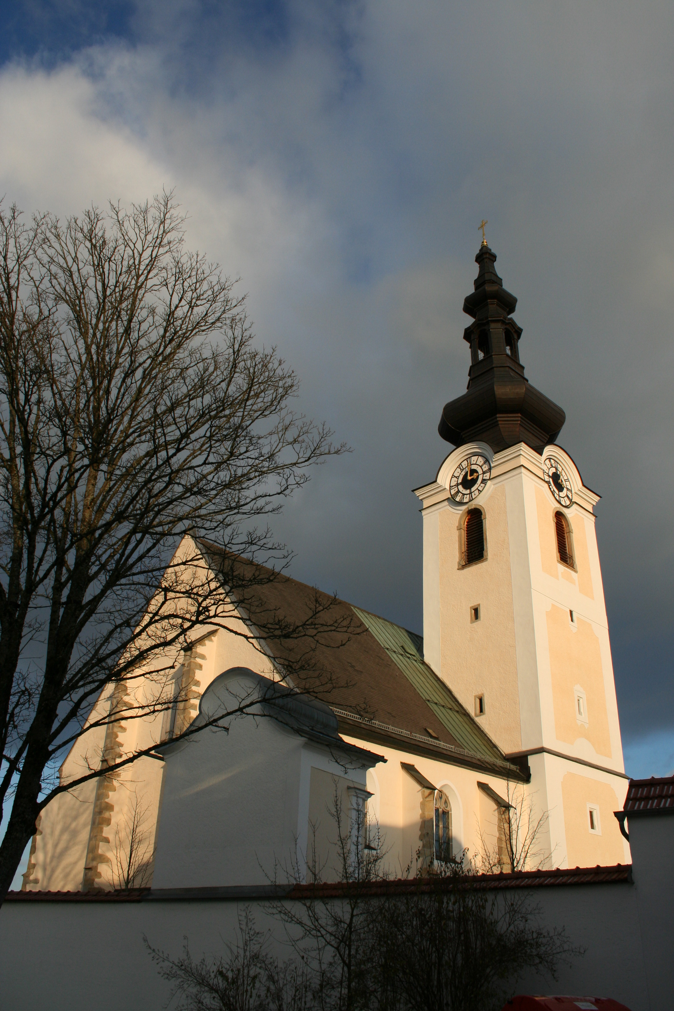 Kath. Pfarrkirche hl. Laurentius